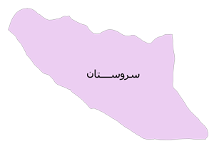 شهرستان سروستان